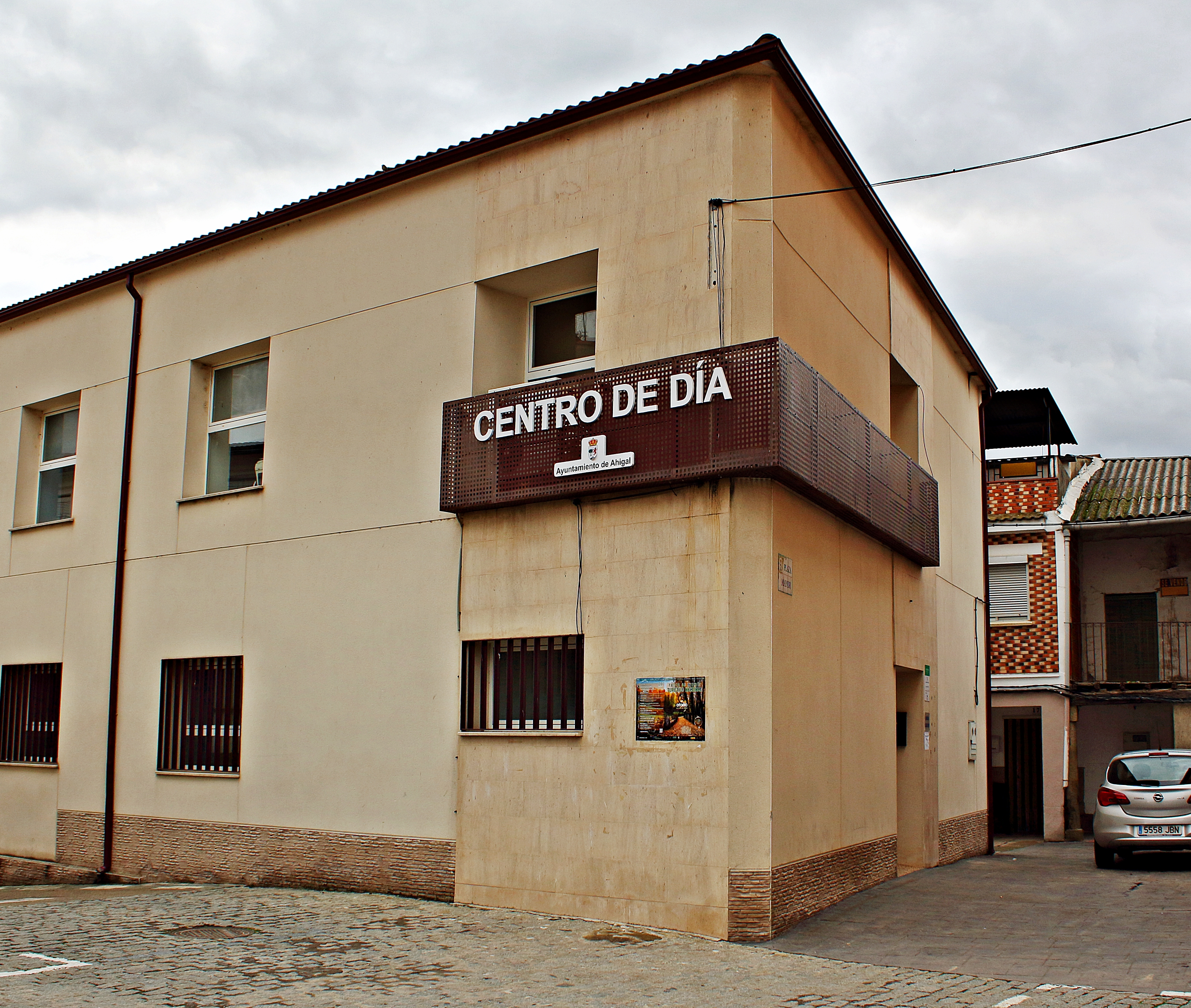 Ahigal, municipio de la comarca de Trasierra-Tierra de Granadilla, provincia de Cáceres